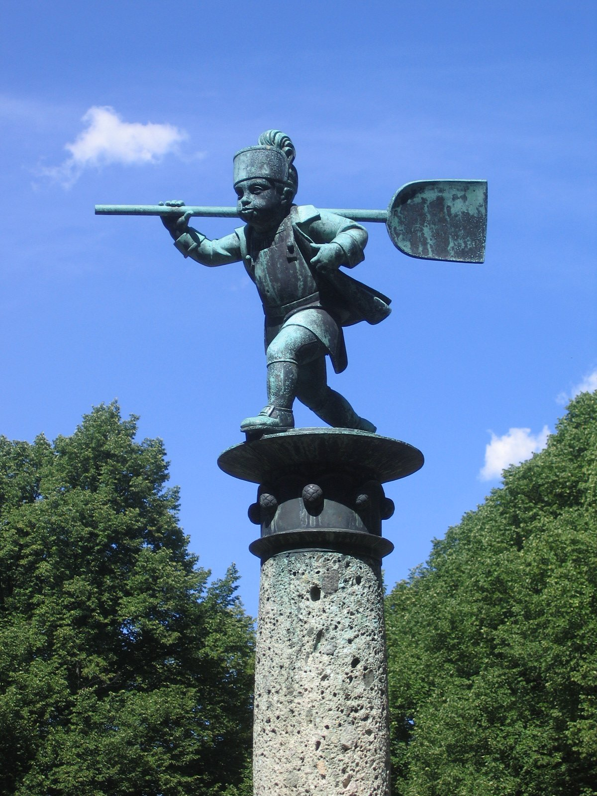 Schülein-Brunnen in München, Detail